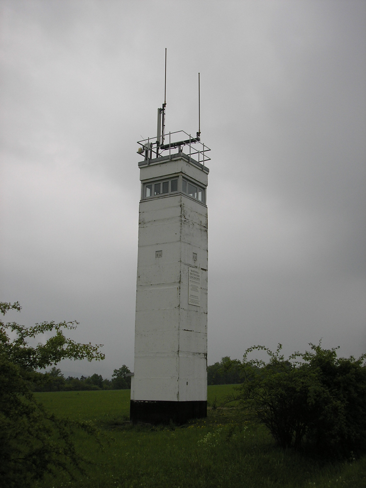 DDR-Wachturm am Point Alpha (ehem. innerdt. Grenze).